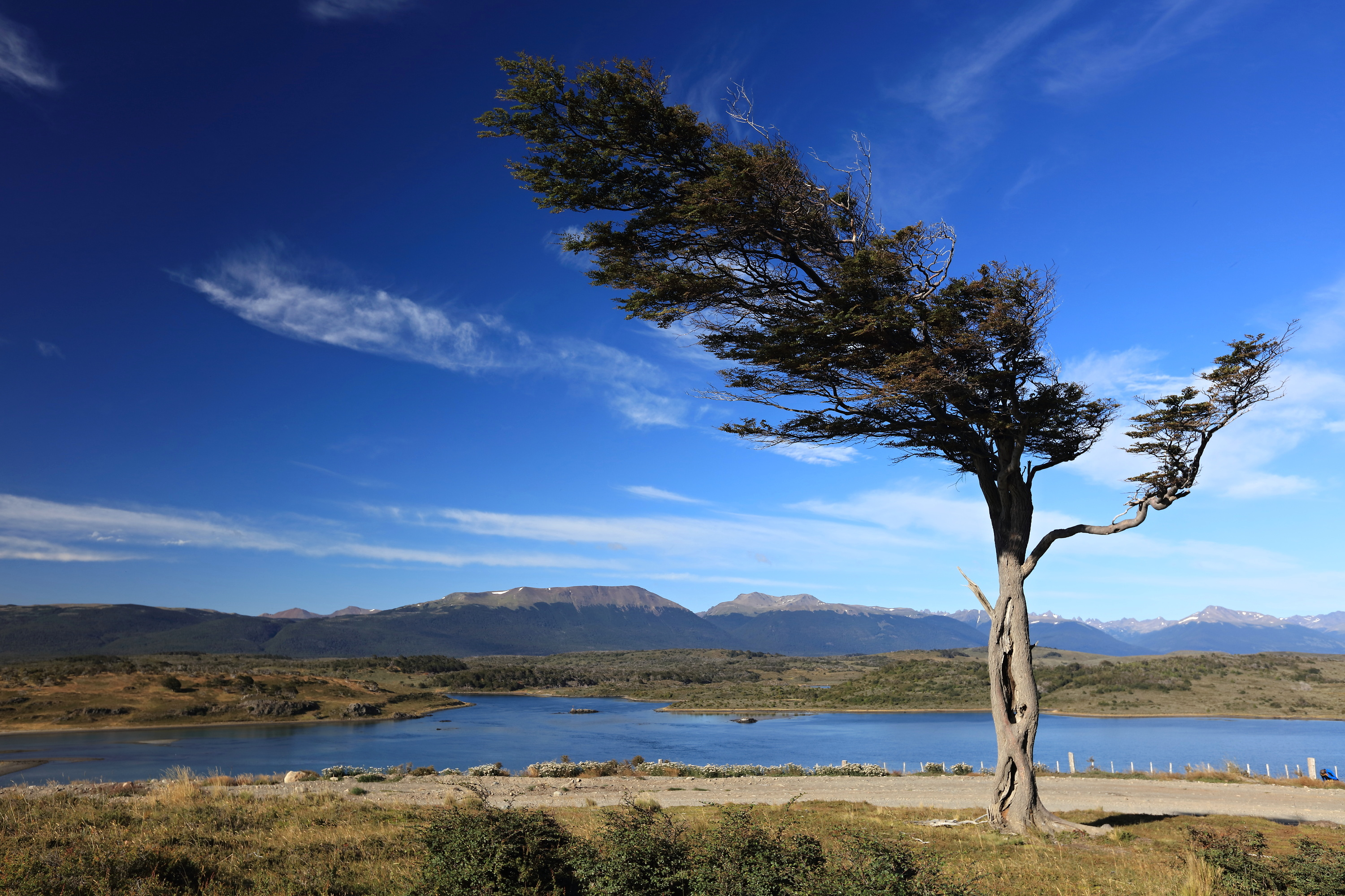 Muy probablemente es un árbol de la especie Nothofagus antarctica llamado localmente ñire en la Patagonia. Esta deformación por los vientos constantes del oeste es típica del ecotono entre el bosque magallánico del sur y la estepa del norte de la isla. Fuente: Ecología de los bosques de Tierra del Fuego. Frangi, Barrera, Puigdefábregas, Yapura, Arambarri y Richter